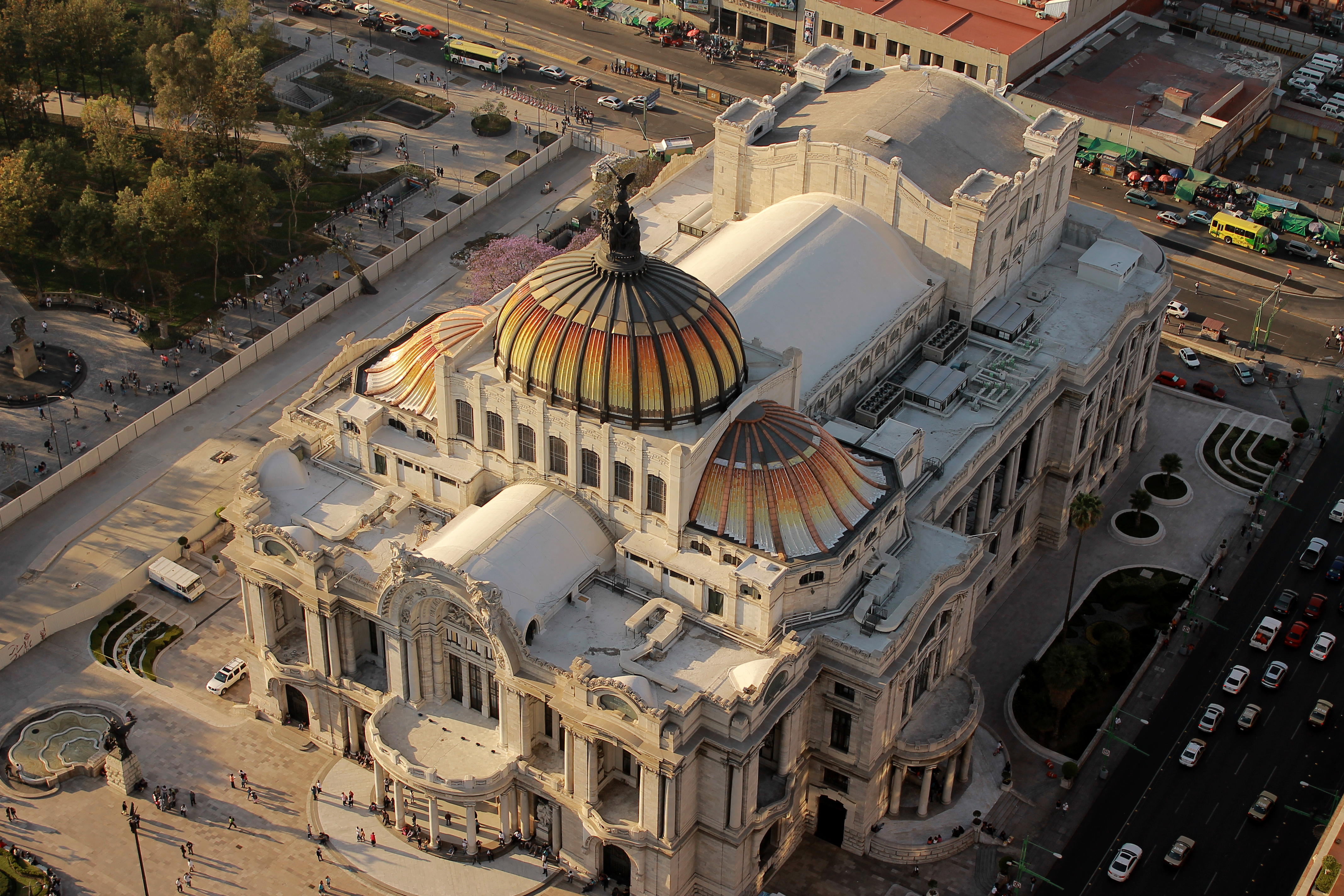 Vista desde el mirador de la Torre Latinoamericana. México, D.F